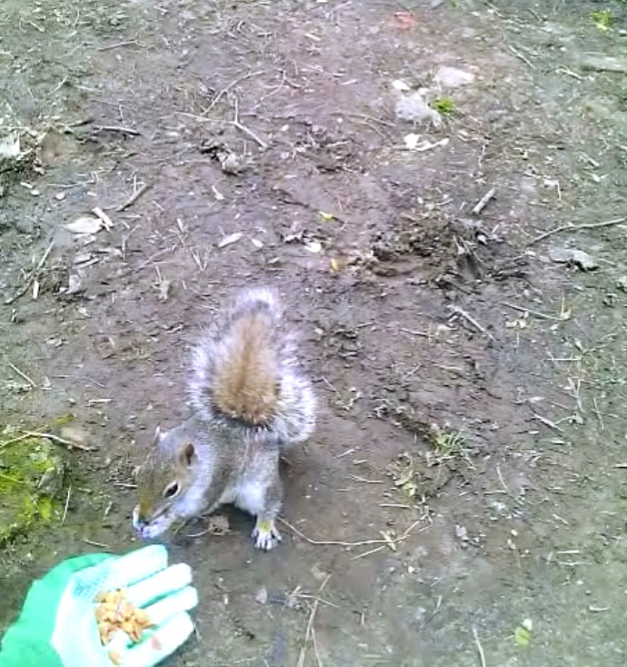 Écureuil Gris nourri par un passant, Queens Park, Glasgow. © Alex Vernillet, 2015.